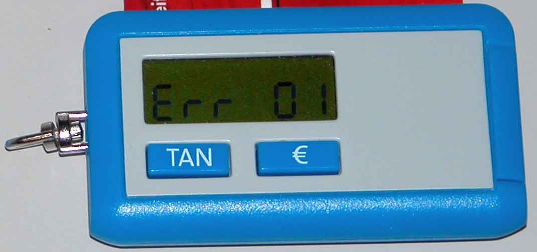 sm@rt-TAN-Generator und Lesegerät für Geldkarte. Volksbank Branding. Gerät von KOBIL hergestellt.